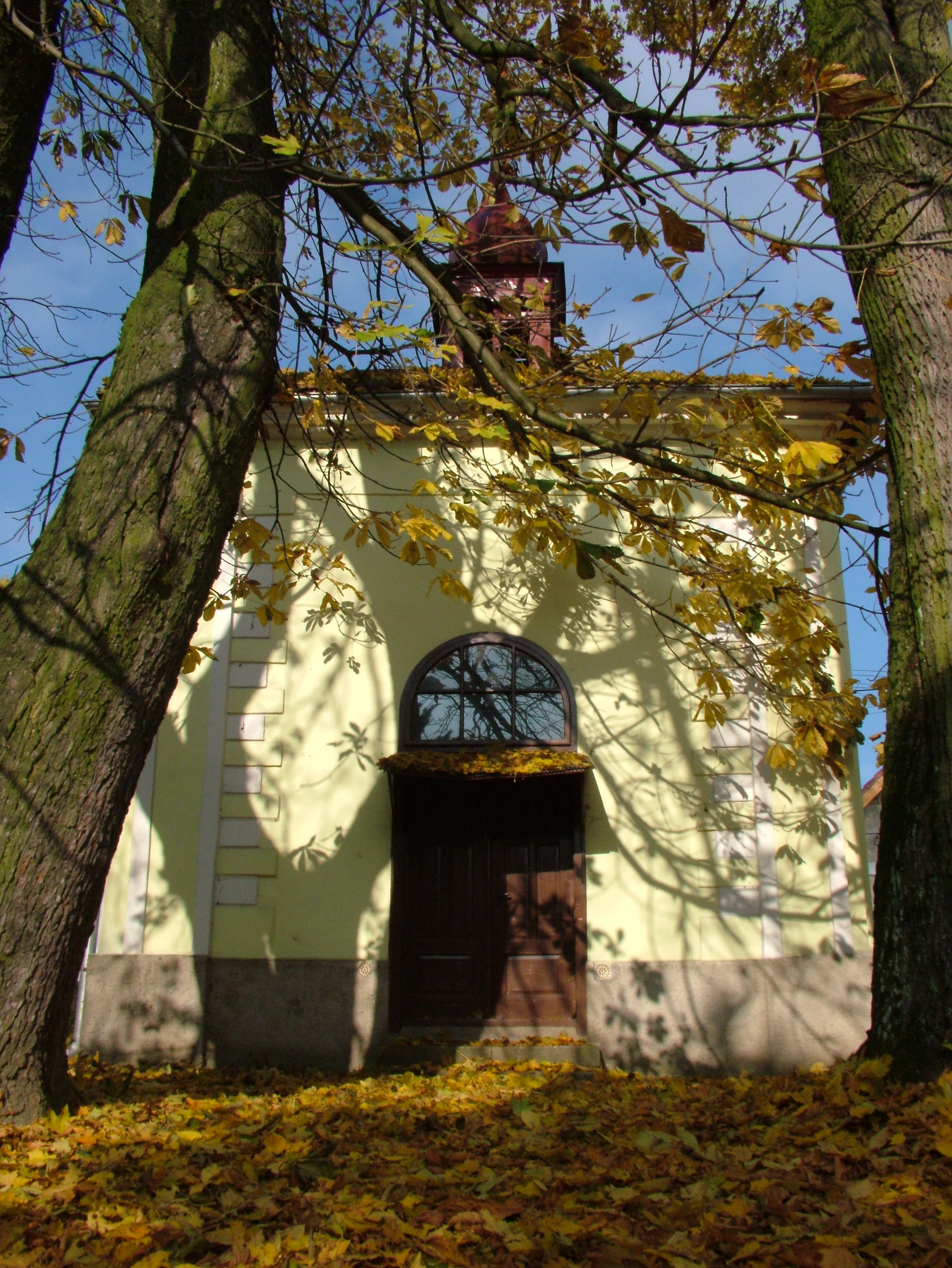 Kaple sv. Floriána v Nadějově